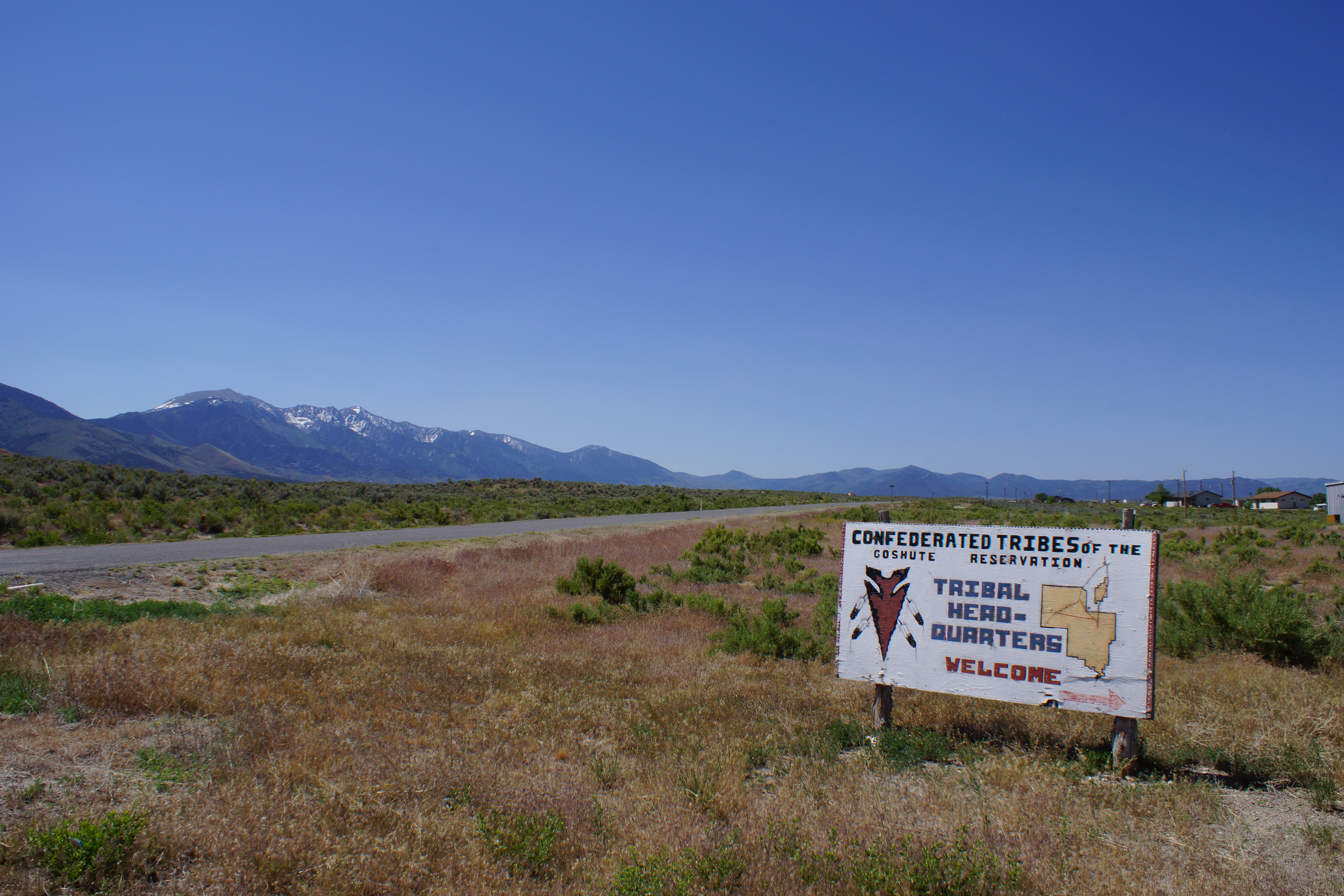 2014, Goshute